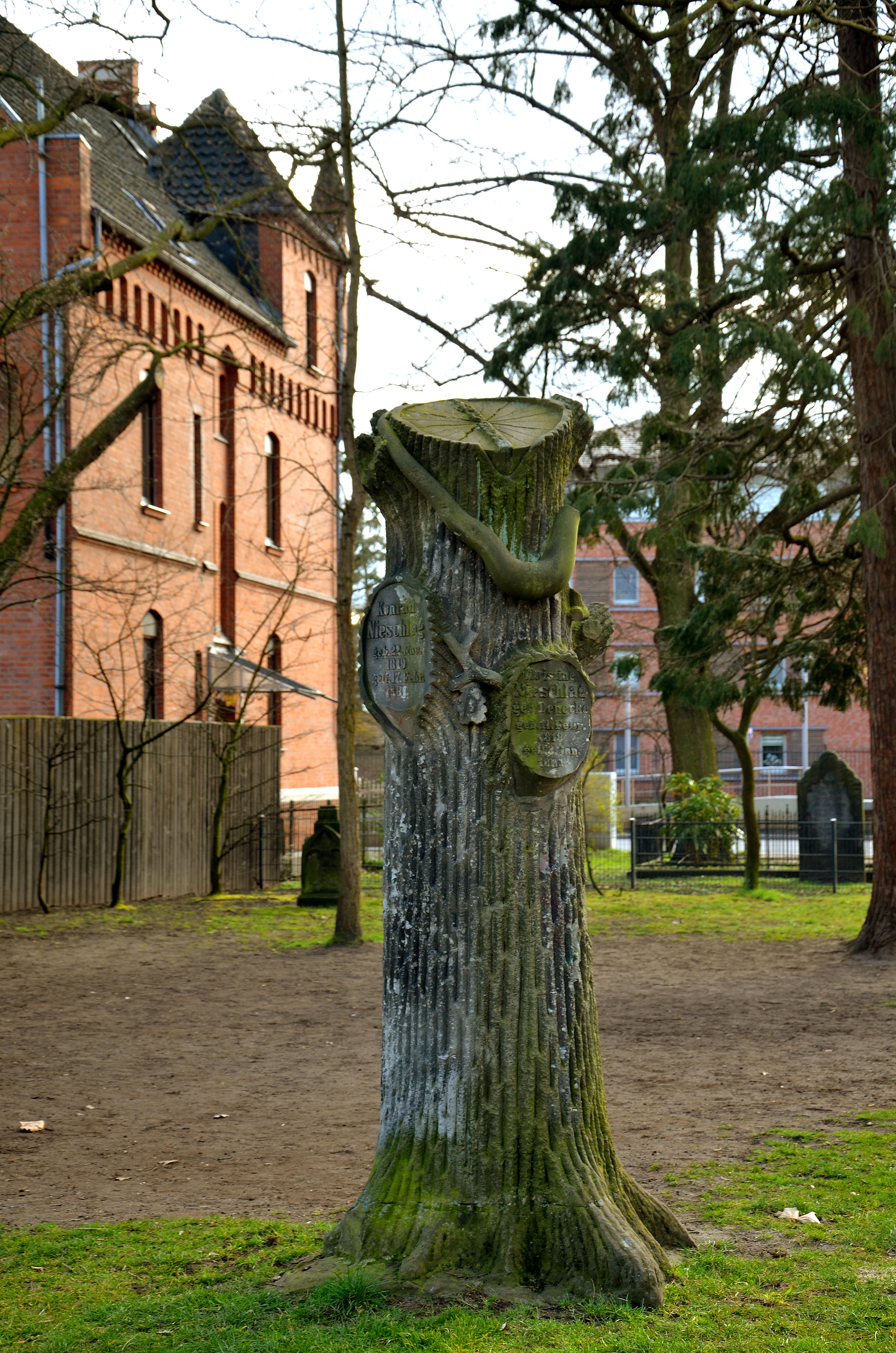 Im Anschluss an eine vom Freundeskreises Hannover organisierte Führung durch das Luftfahrt-Museum Laatzen-Hannover am 23. März 2016 enstand dieses Foto des als Baumstamm ausformulierten Grabmales auf dem Alter Wülfeler Friedhof an der Hildesheimer Straße 367 in Hannover. Die Inschiften wurden erstellt für „Konrad Nieschlag, geb. 22. Nov. 1819, gest. 17. Febr. 1881“ sowie für „Christine Nieschlag, geb. Denecke, geb. 11. Febr. 1818, gest. 3. Jan. 1883“ Der Eichenstamm wird von einer nicht mehr vollständig erhaltenen Schlange umwunden ...